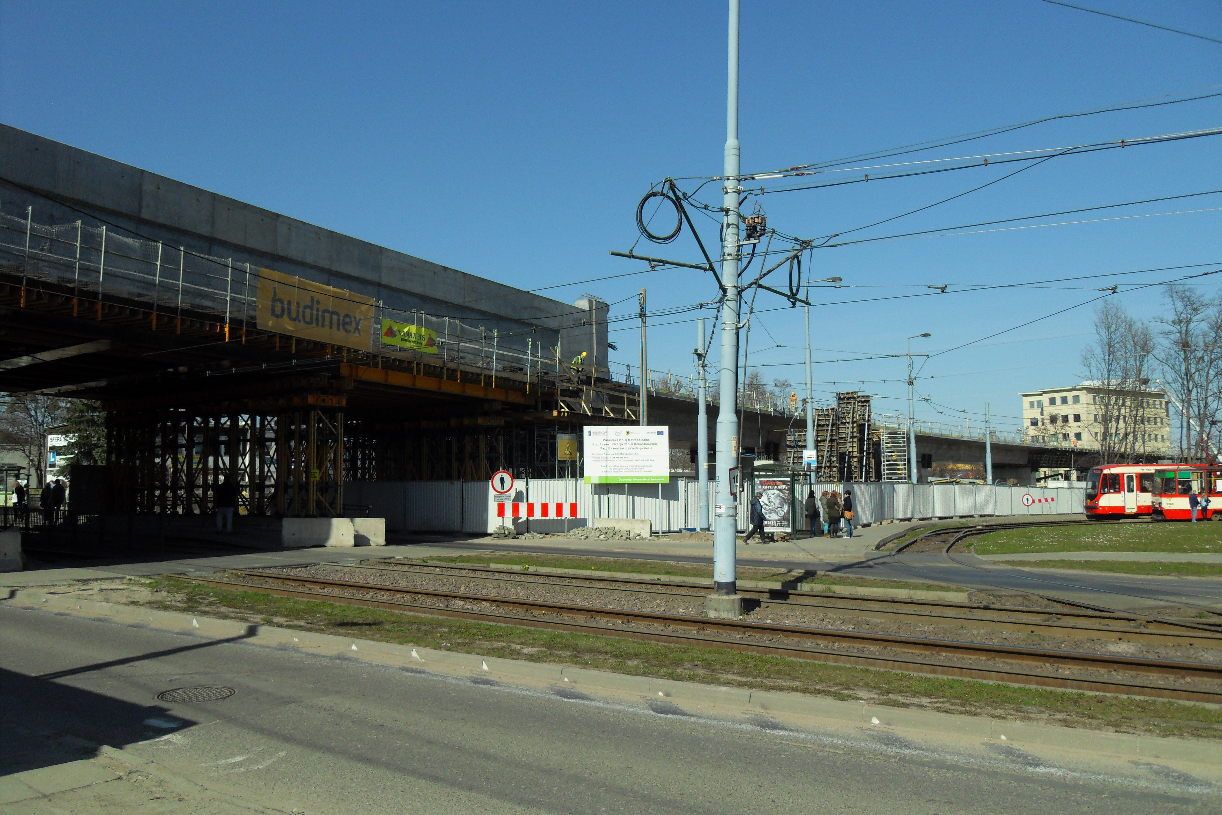 Gdańsk Strzyża, ul. Wita Stwosza. Pomorska Kolej Metropolitalna w budowie.